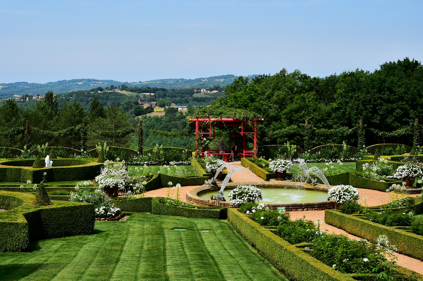 Jardins du Manoir d'Eyrignac, Rosen- Brunnengarten